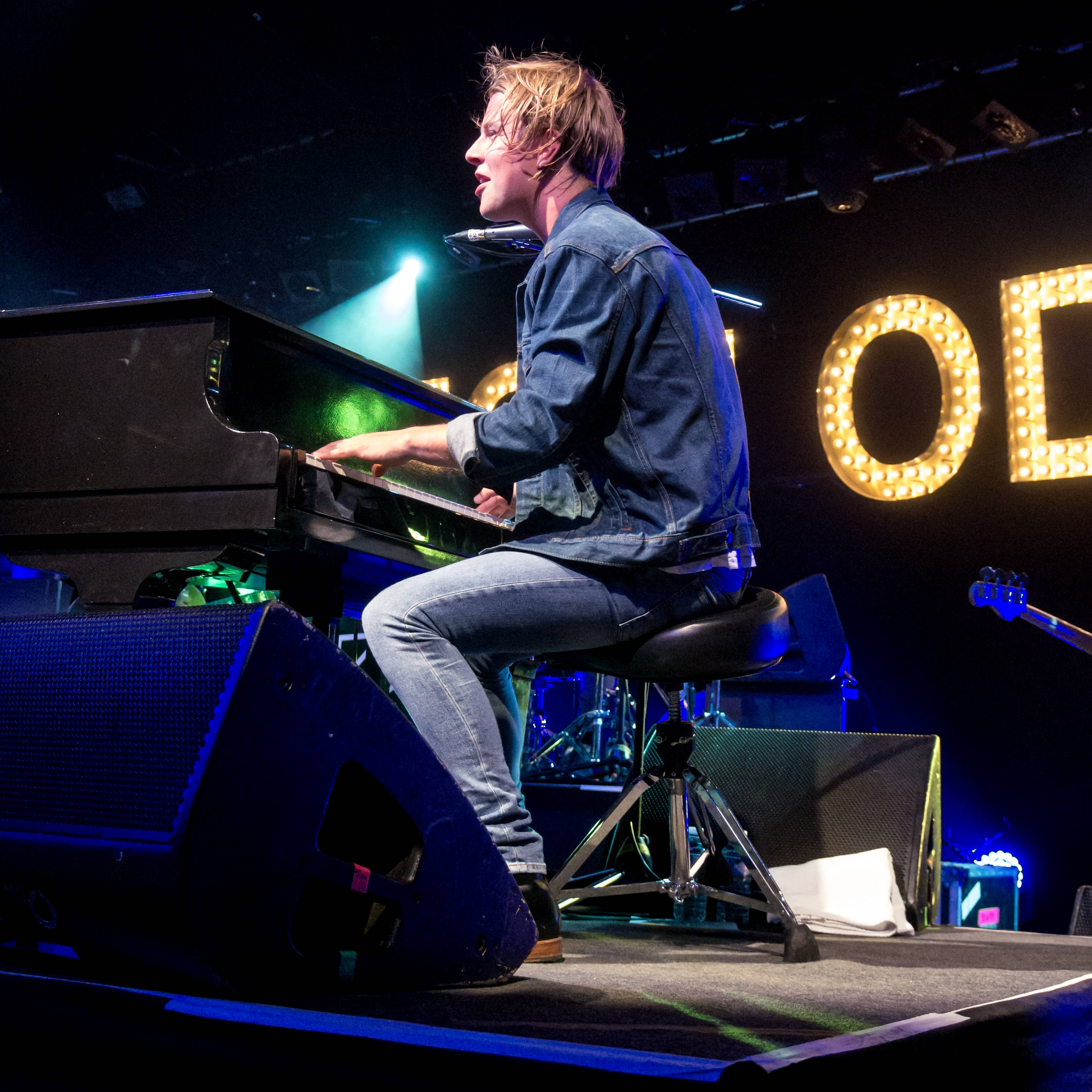 Bilder vom ZMF 2015 Tom Odell 16. Juli 2015